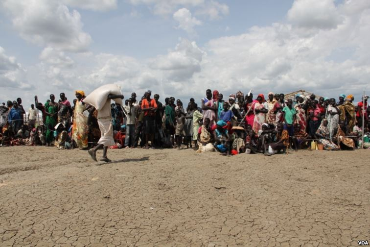 Des gens s'alignent pour recevoir la nourriture à Bentiu, Sud Sudan, le 30 mai 2014. (Benno Muchler/VOA)